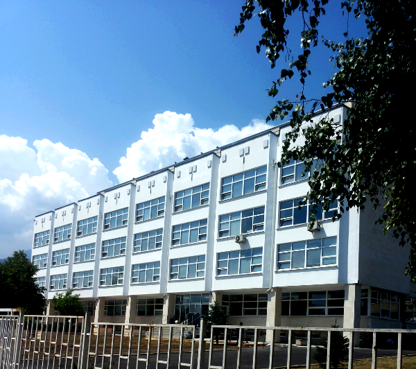 Новият корпус на УНСС, в който се помещава юридическият факултет